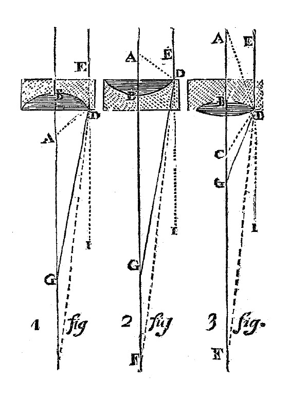 Une illustration des Fragments de Dioptrique.